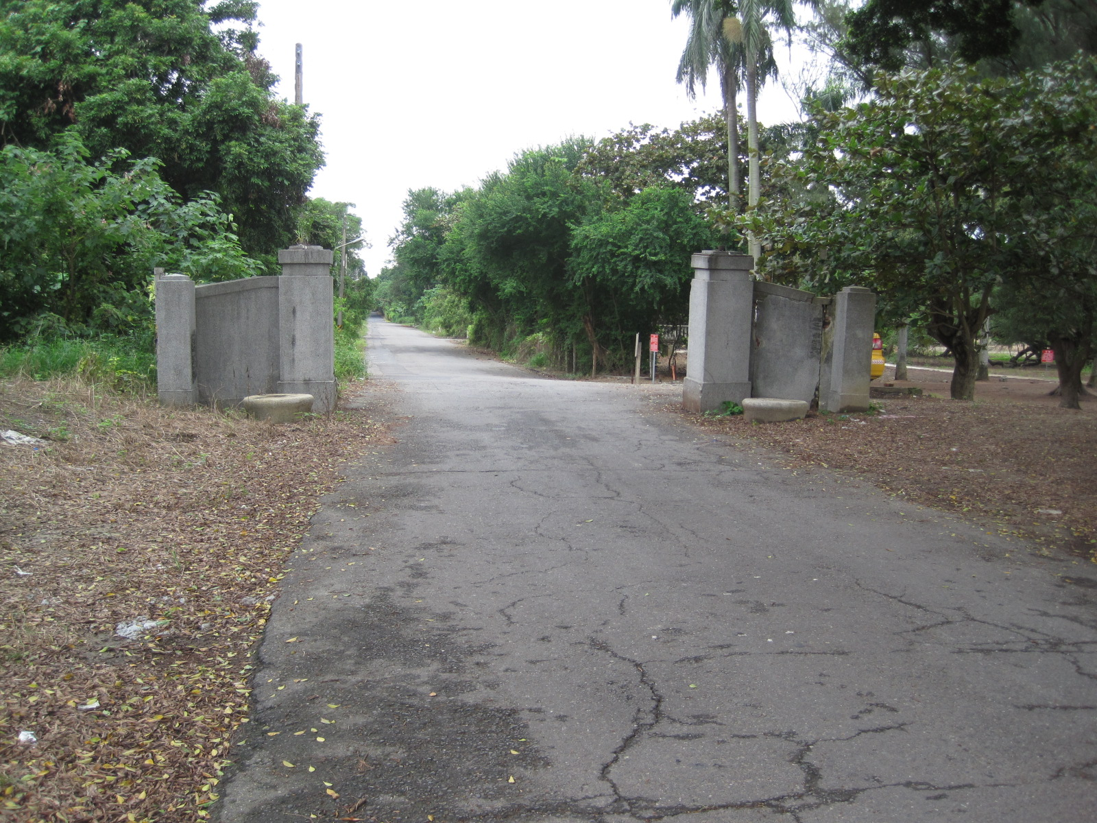 永康糖廠宿舍區大門